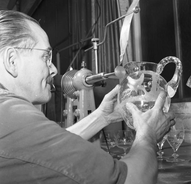 Glasveredelungs-Industrie, Firma Franz Witwer K.G. Brühl